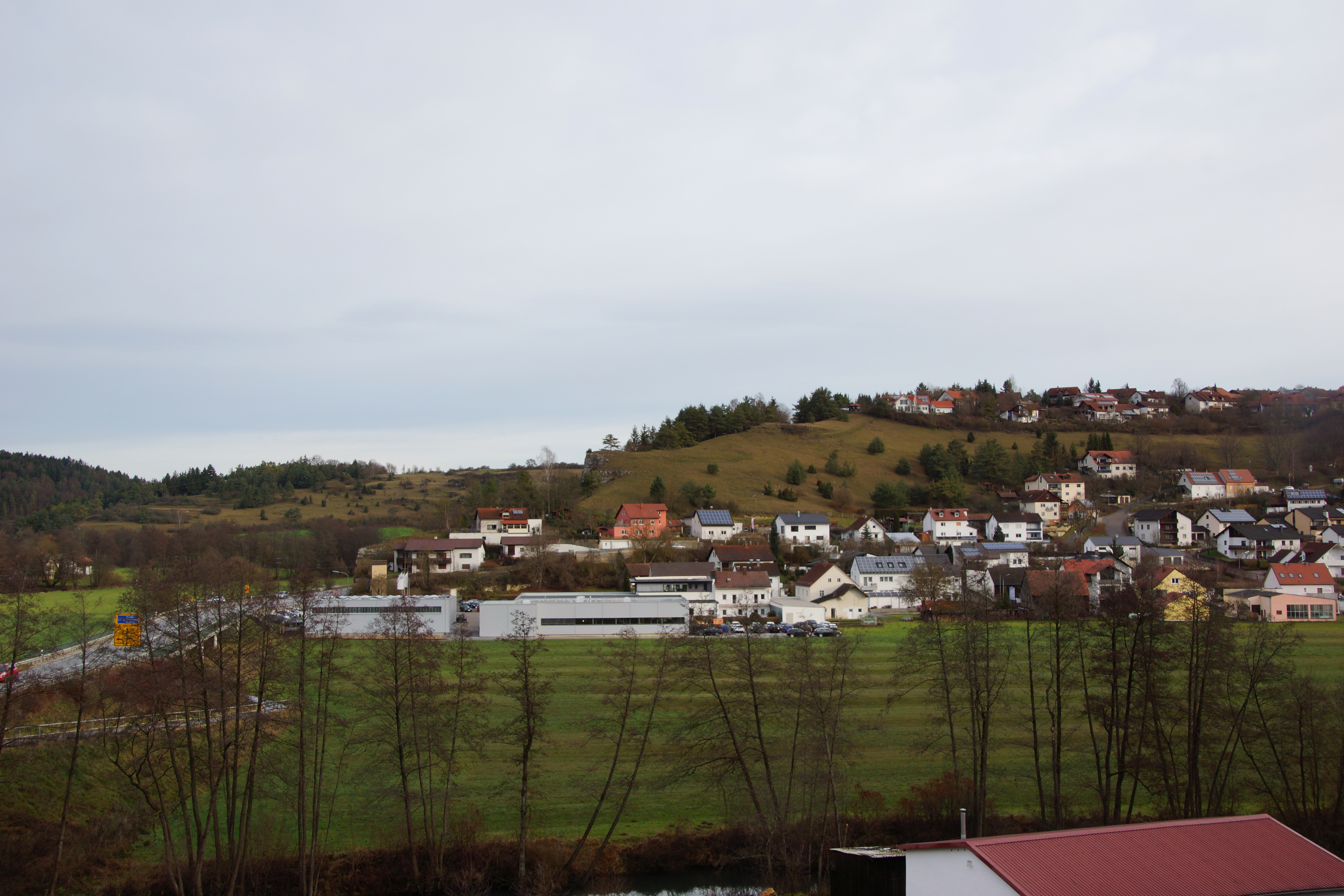 Deuerling in der Oberpfalz